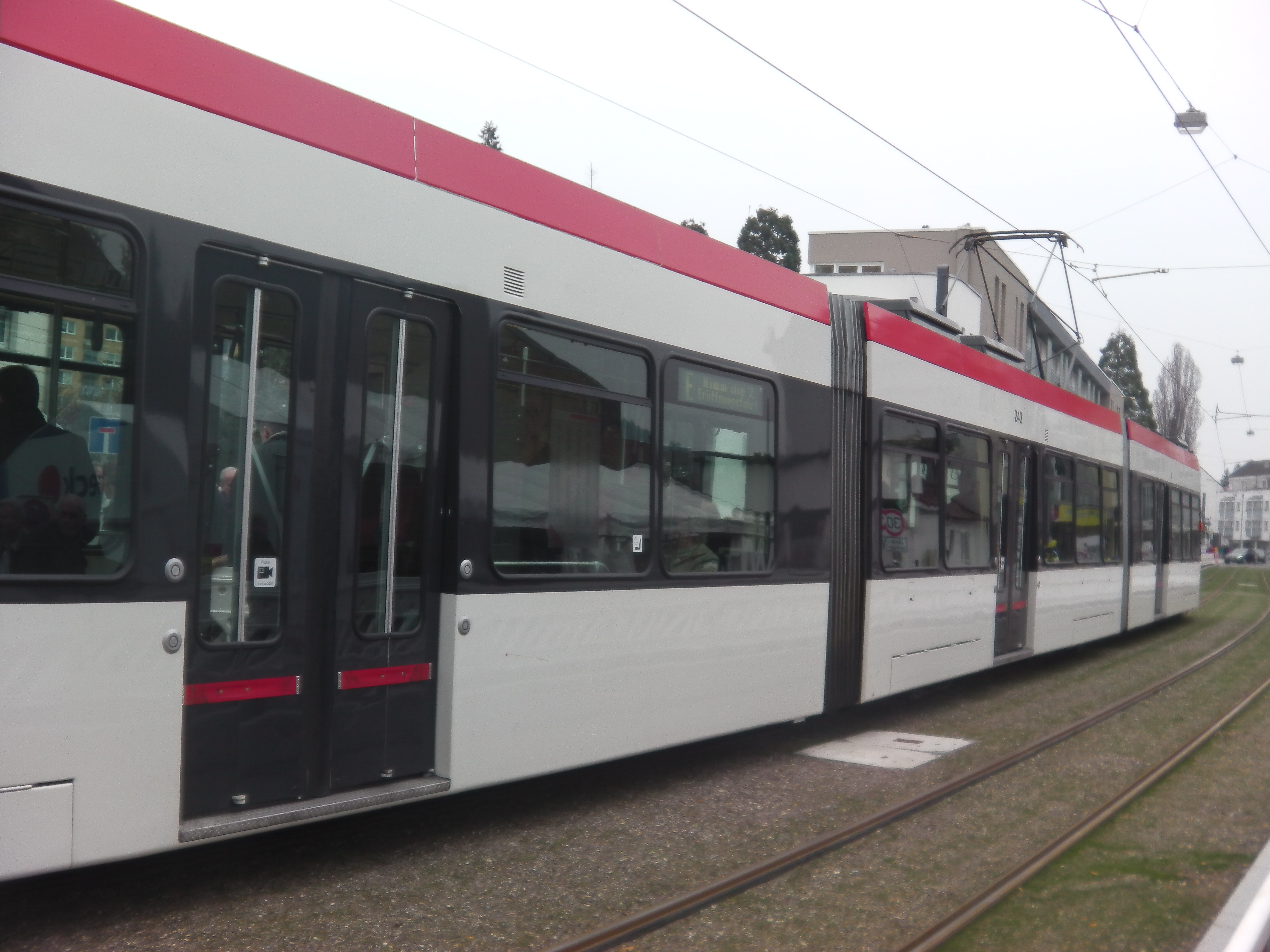 GT8Z 243 der Straßenbahn Freiburg im Breisgau im Redesign, aufgenommen während der "Taufe" anlässlich der Innbetriebnahme der Neubaustrecke zur Gundelfinger Straße